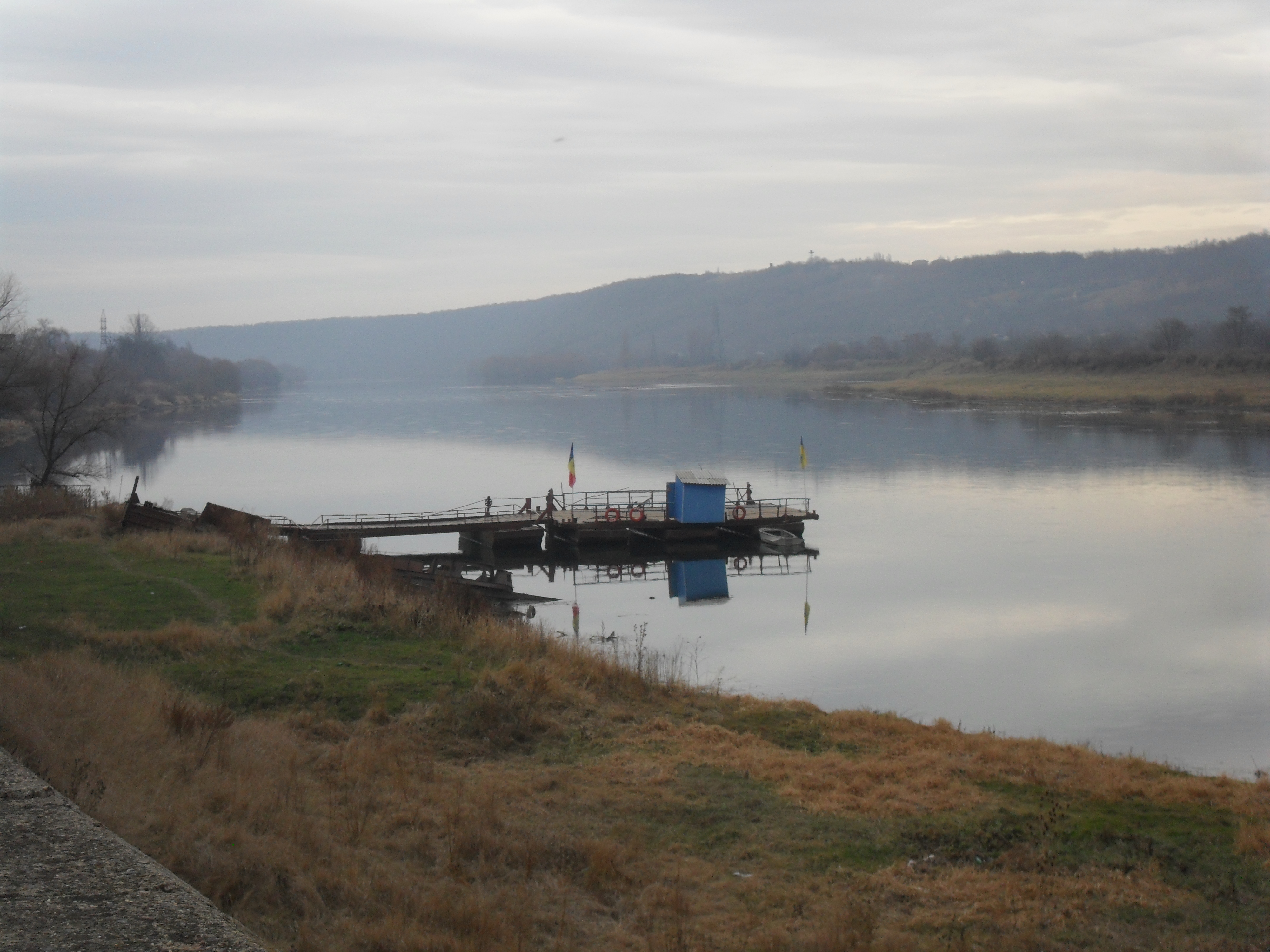 м. Сороки. Паром на міждержавному паромному пункті пропуску "Сороки"